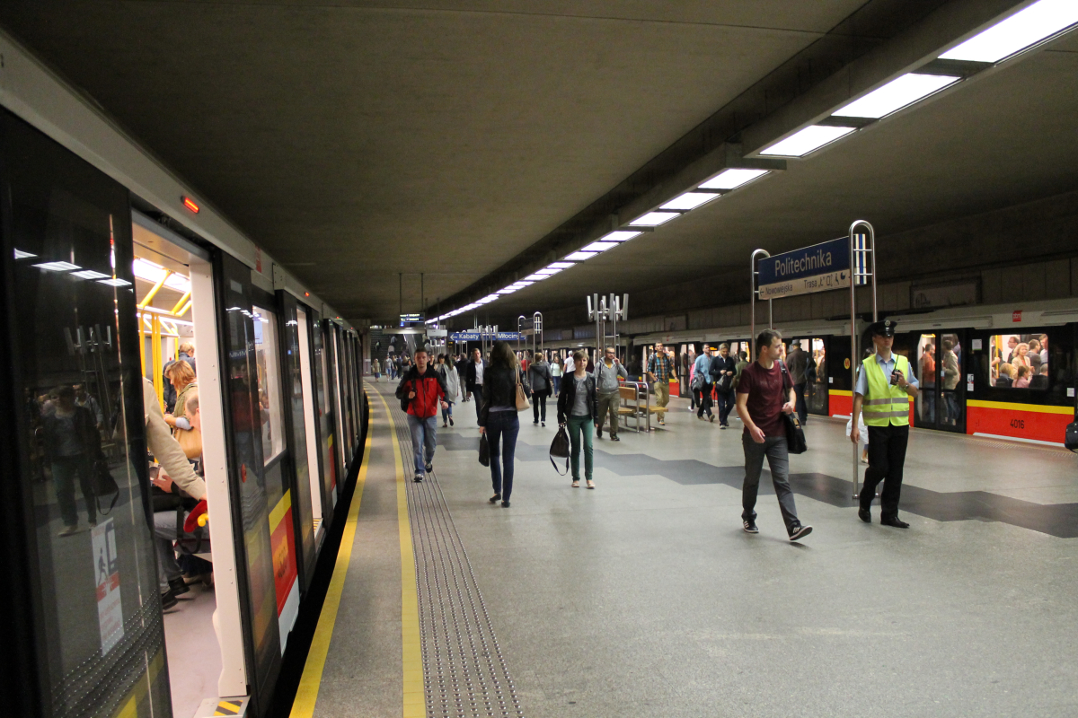 Siemens Inspiro (pociągi numer 60 i 56) stoją na stacji A11 Politechnika. This photo was taken during Railway Wikiexpedition 2014 set up by Wikimedia Polska Association in cooperation with Fundacja Grupy PKP. You can see all photographs in category Wikiekspedycja kolejowa 2014.